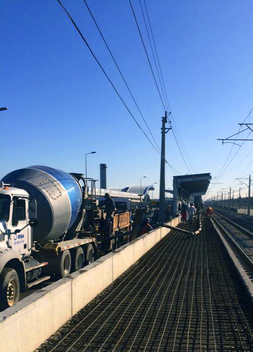 Obras civiles andén estación Megacentro